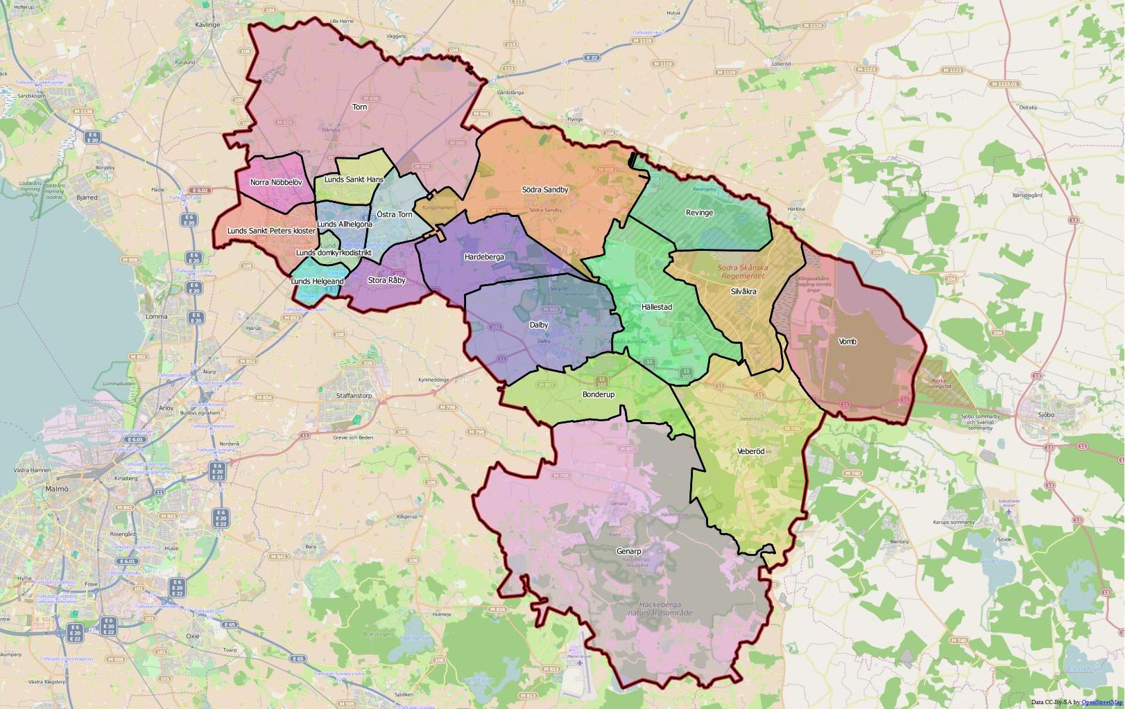 Distriktsindelningen i Lunds kommun.